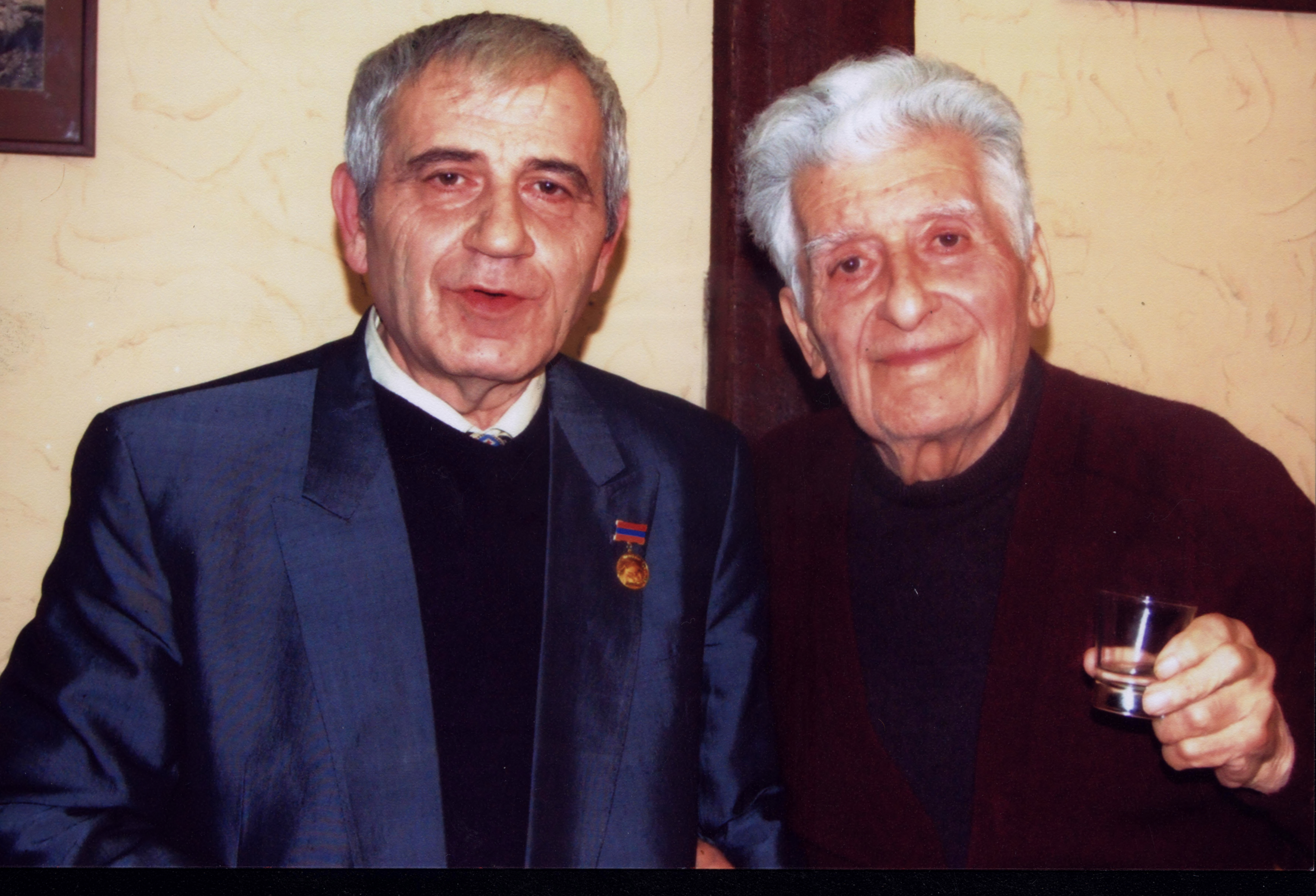 Рубен Саркисян с композитором Э. Мирзояном после вручения Государственной премии РА